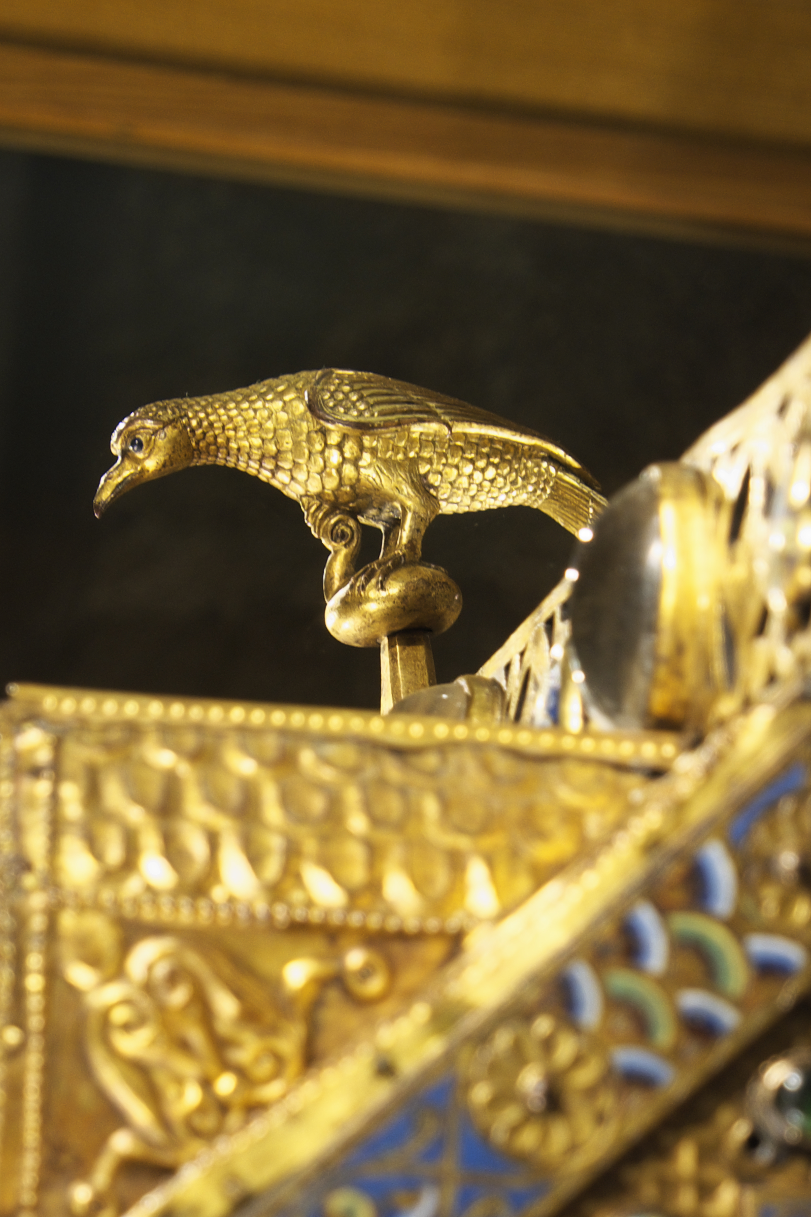 Katholische Pfarrkirche Saint-Antoine in Ambazac im Département Haute-Vienne (Nouvelle-Aquitaine/Frankreich), Reliquienschrein von Ambazac, zwischen 1180 und 1200, Vogel